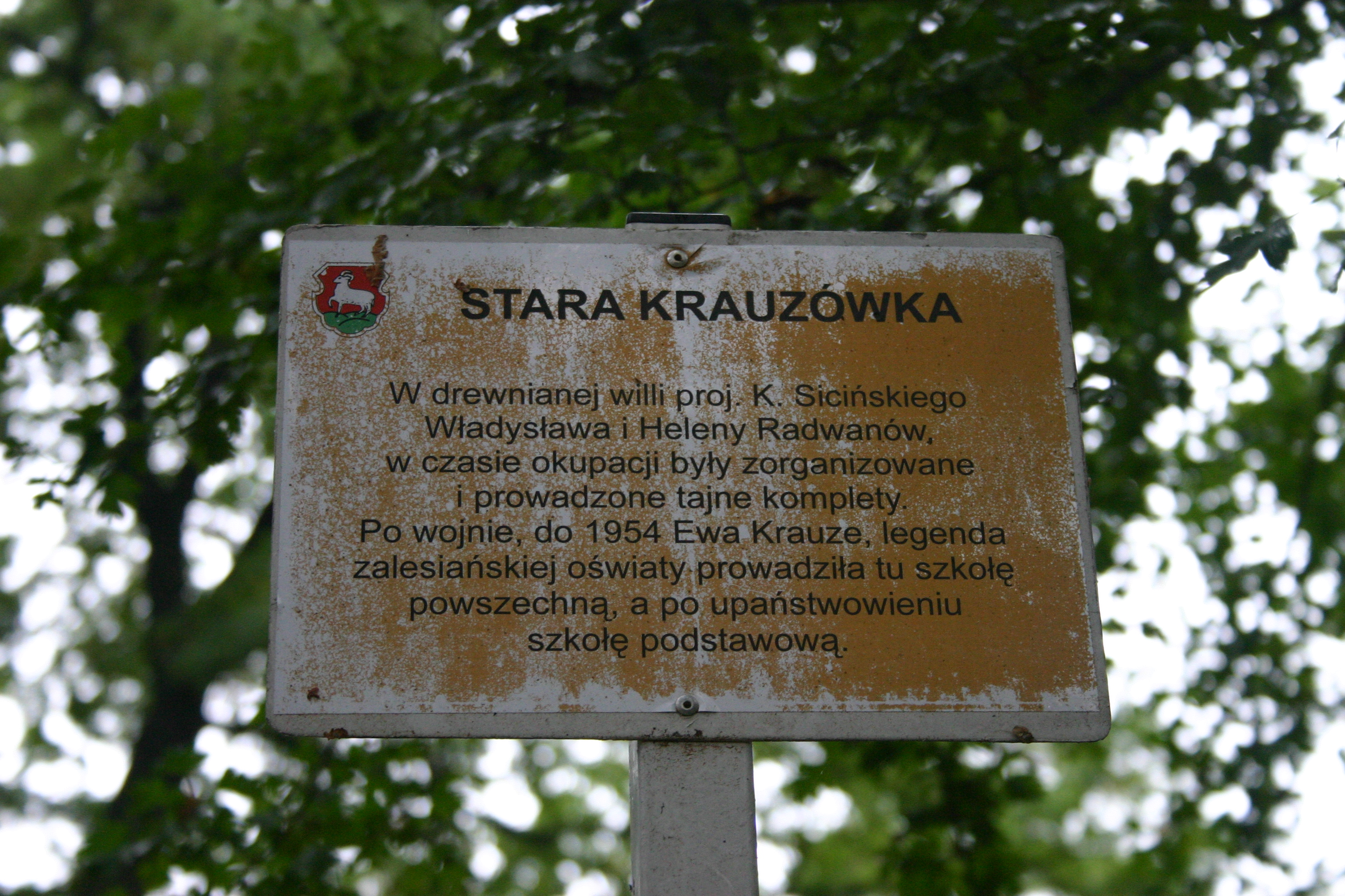 willa „Siedziba” z ogrodem (1920), czyli tzw. "Stara Krauzówka" Piaseczno-Zalesie Dolne, ul. Anny Jagiellonki 8/10, Gmina Piaseczno